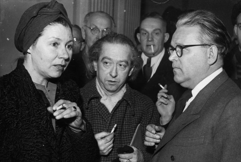 Hamburg, Prozess gegen Veit Harlan Illus-dpd Ferdinand Marians Witwe als Zeugin im Harlan Prozess Die Witwe des bekannten deutschen Filmschauspielers Ferdinand Marian, der die Titelrolle im Film "Jud Süss" spielte, erschien heute im Harlan-Prozess als Zeugin. In ihren Aussagen entlastete sie den Angeklagten Veit Harlan, der "wie ihr Mann von Goebbels zu diesem Film gezwungen worden sei". Unser Bild zeigt Frau Maria Marian mit Veit Harlan in einer Verhandlungspause. 16-3-49 [Herausgabedatum] 2965-49 Abgebildete Personen: Maria Marian, Gattin des verstorbenen Ferdinand Marian (Filmschauspieler, Deutschland) Harlan, Veit: Schauspieler, Filmregisseur, Deutschland